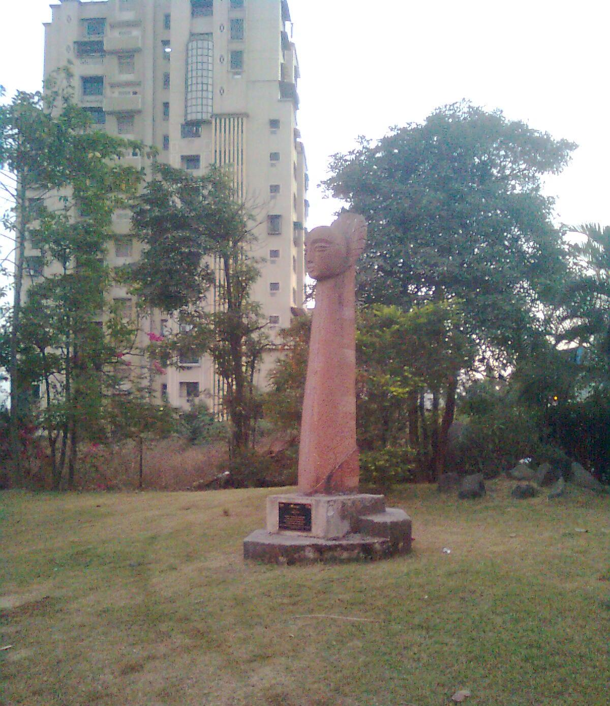 खारघर